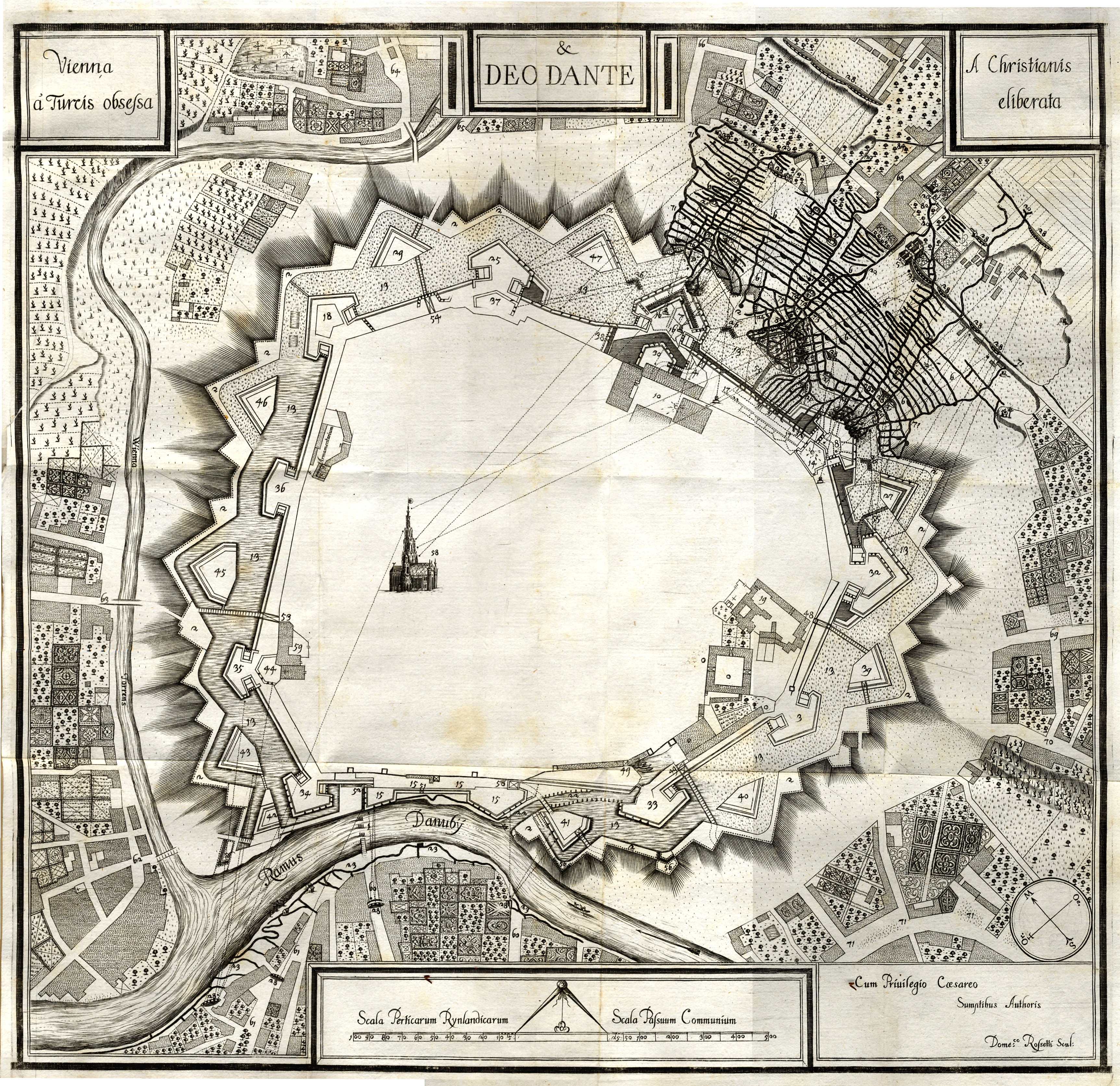 Zeitgenössische Karte der zweiten Wiener Türkenbelagerung. Weitere bibliographische Angaben zur Karte finden sich hier (No. 318)